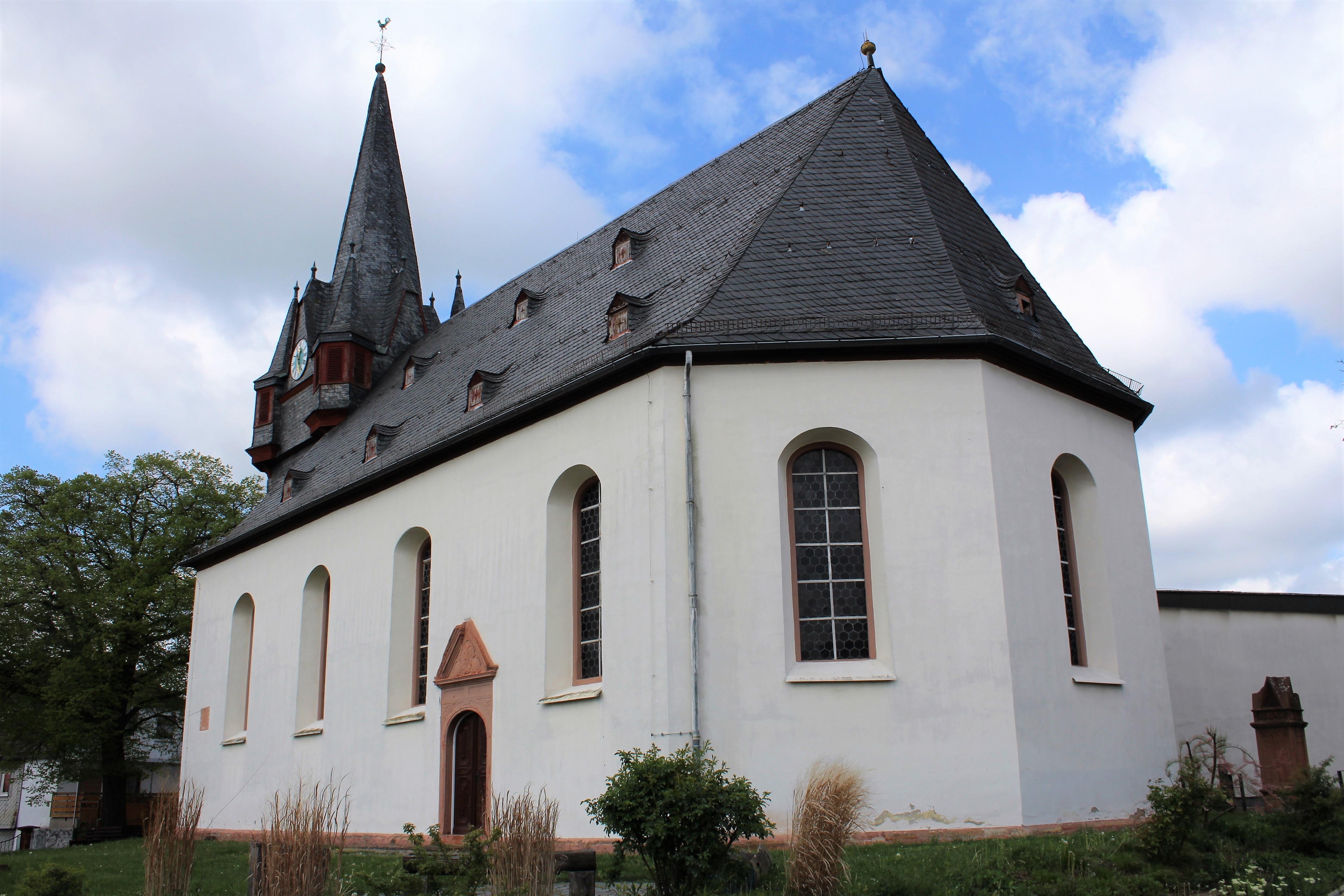 St. Nikolai, Altenstadt, Wetteraukreis, Hessen, Deutschland